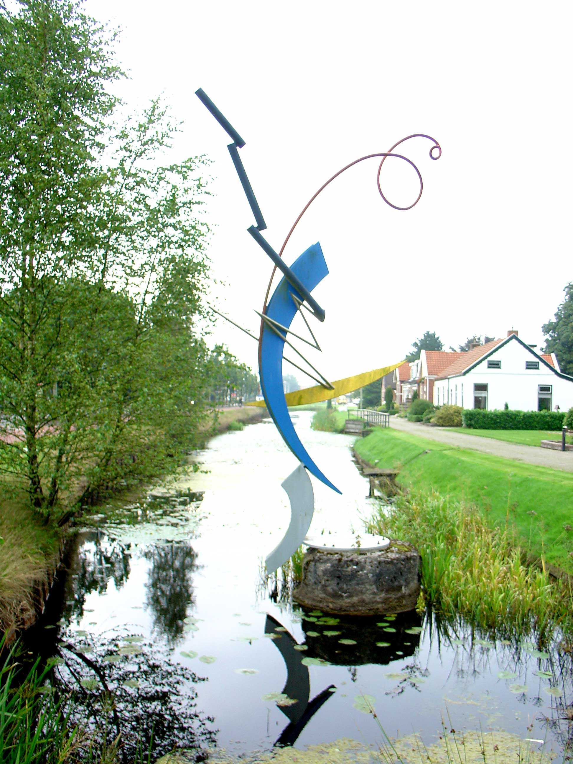 De fontein door Ralph Müller in de Gasselternijveenschemond (1989)